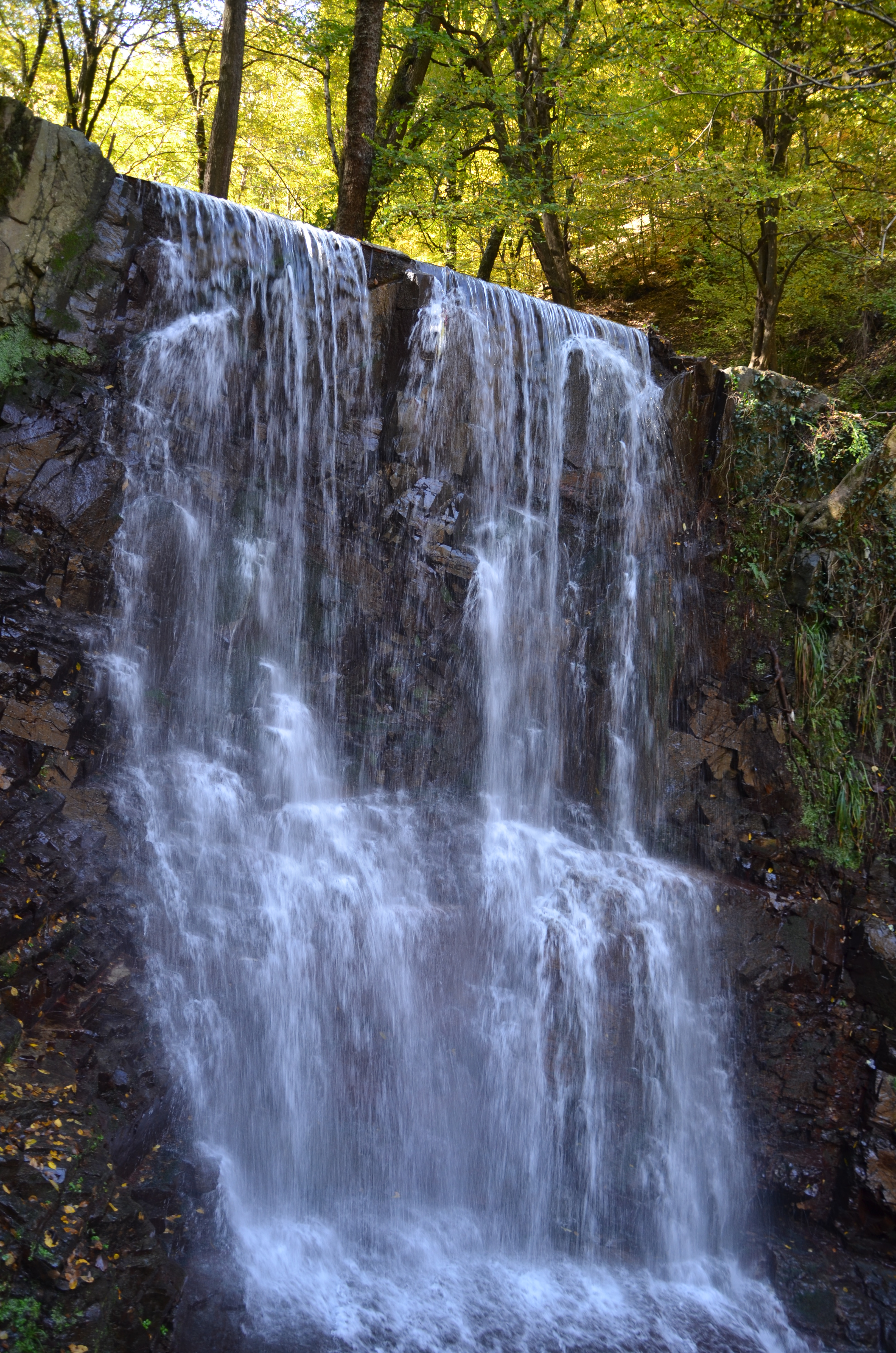 Siyahkal - Deylaman Road - Loonak Waterfall